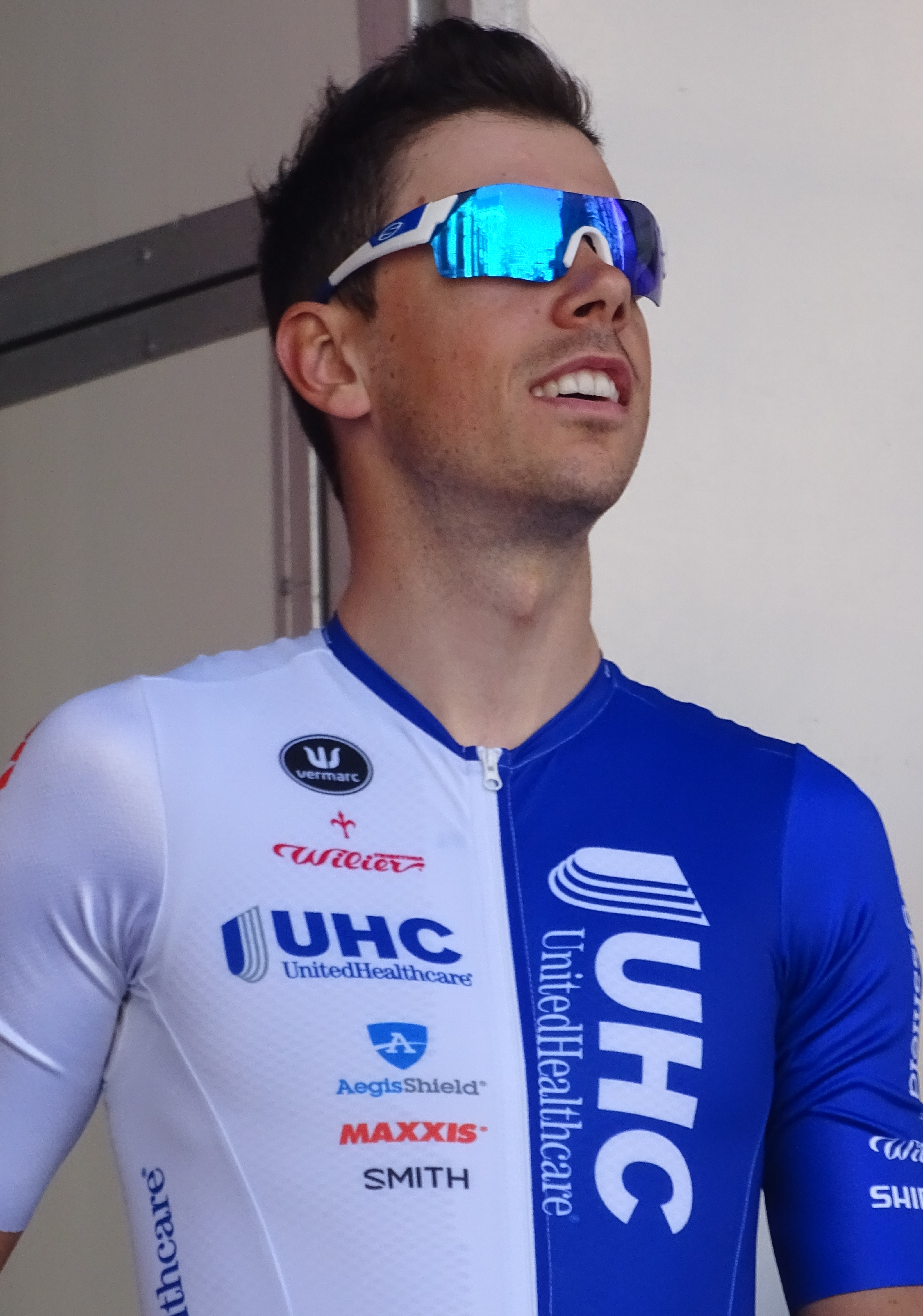 Reportage réalisé le mercredi 15 avril à l'occasion du départ de la Flèche brabançonne 2015 à Louvain, Belgique.